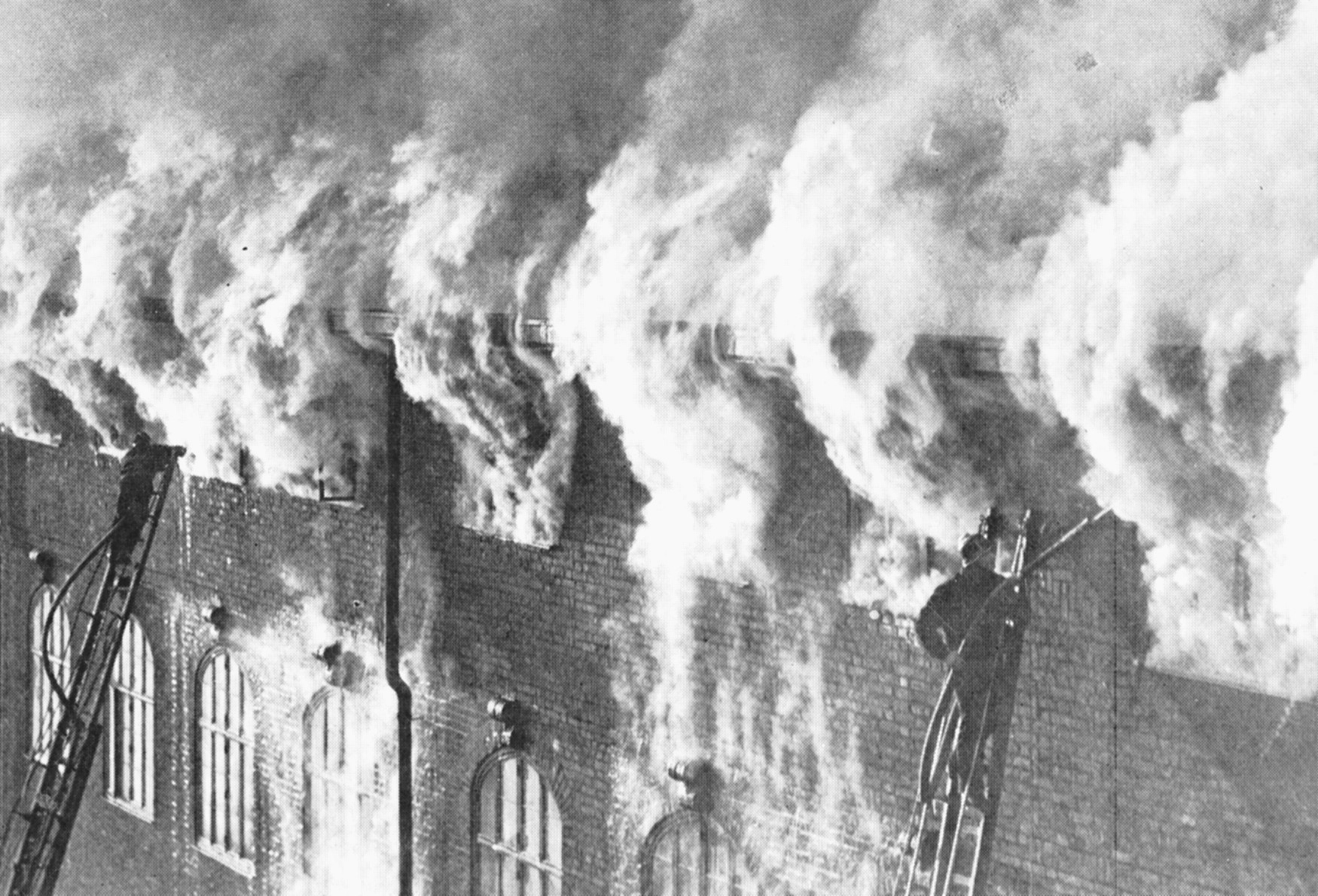 Branden på Mjölkcentralen i Stockholm, 1937